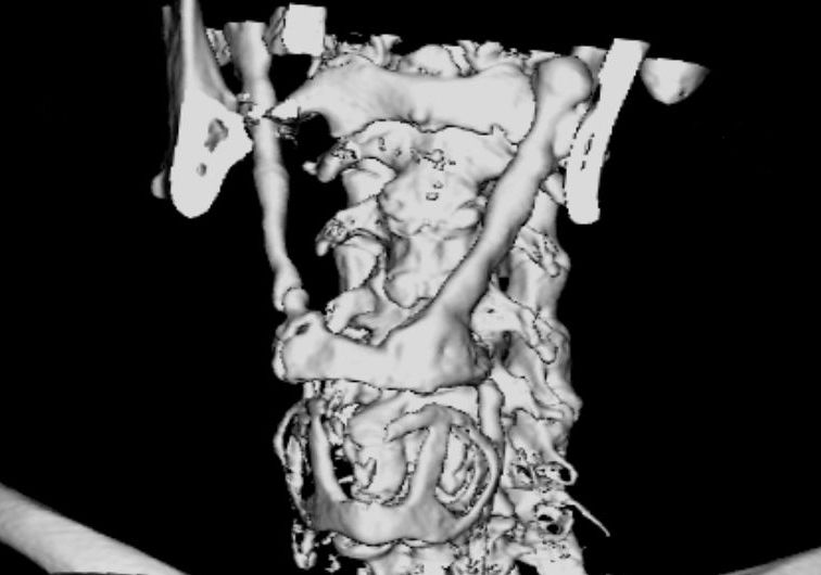 Eagle-Syndrom: 3D-Rekonstruktion einer Computertomographie